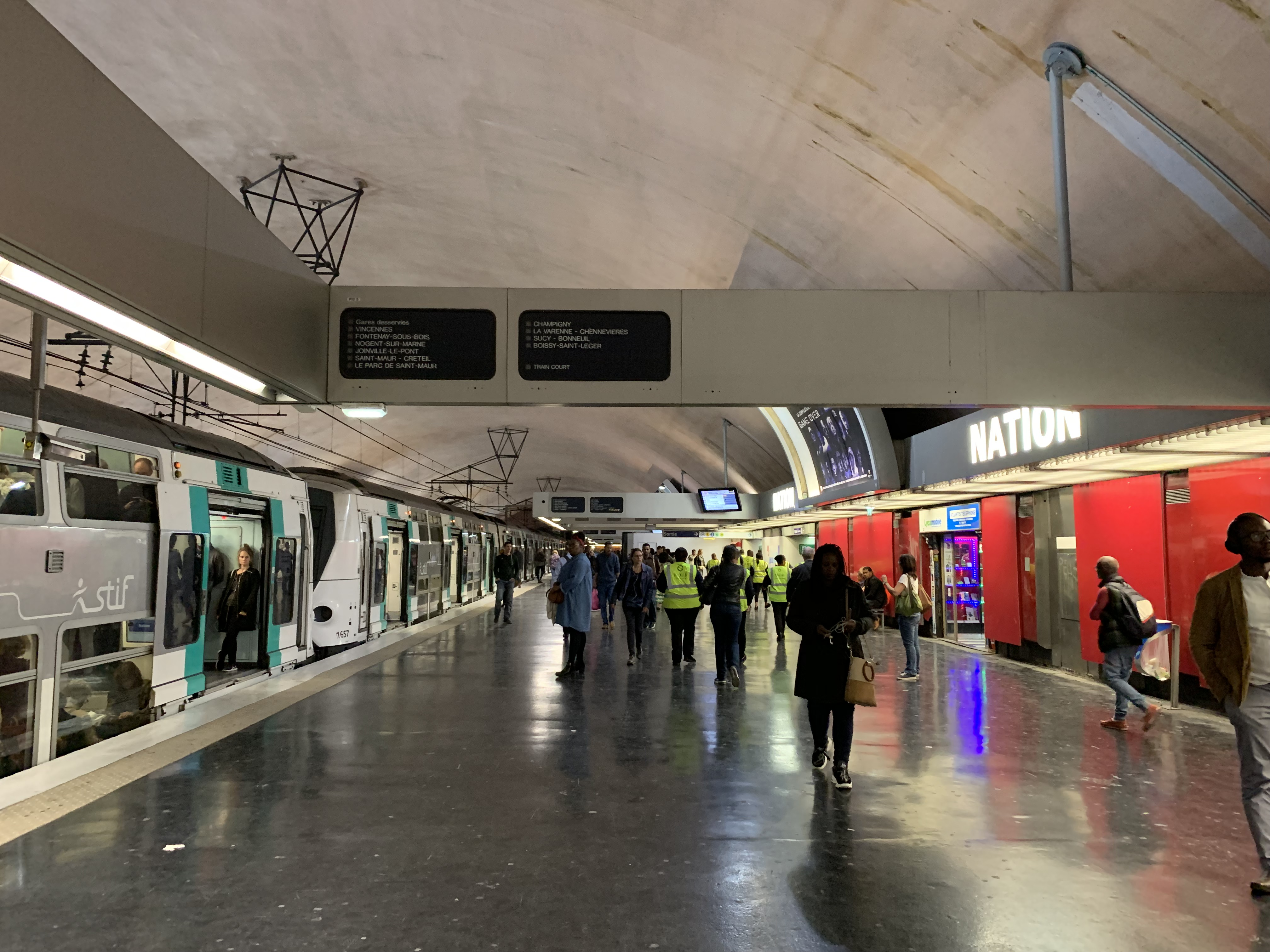 Quais de la ligne A du RER dans la gare de Nation, Paris.